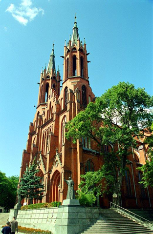 Church in Białystok